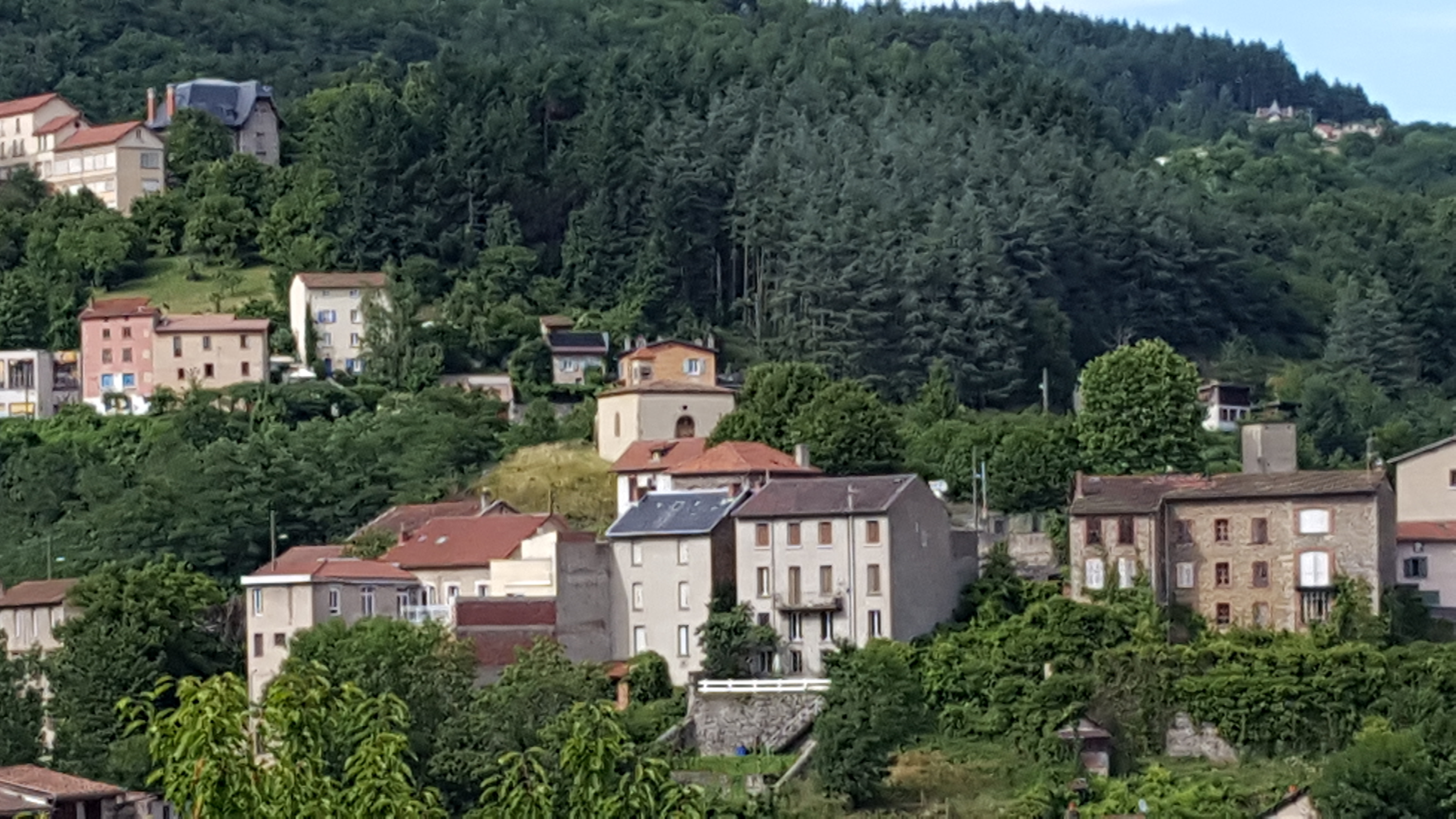 Quartier de la vidalie à Thiers 63